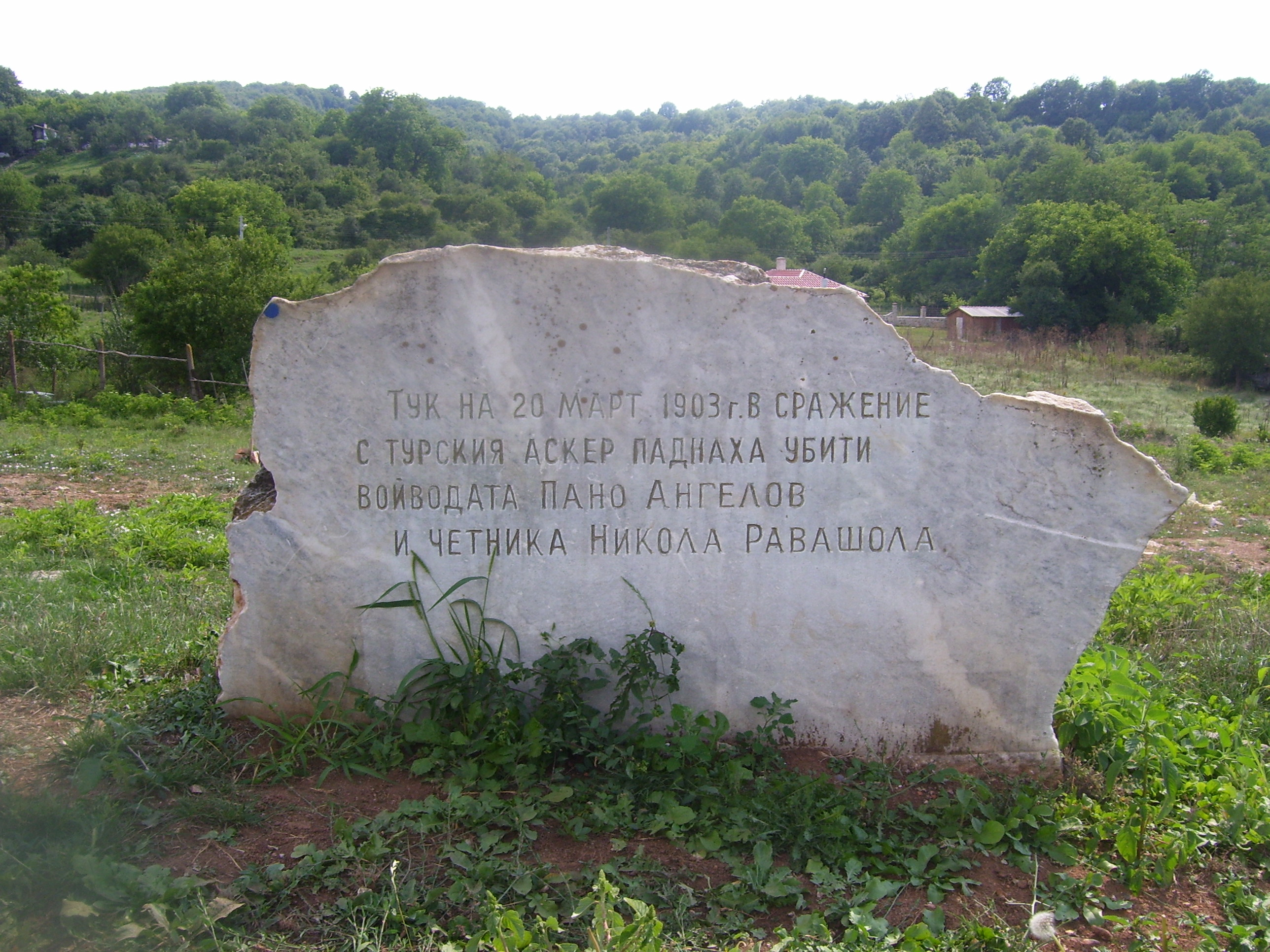 Паметник на мястото на смъртта на войводата на ВМОРО Пано Ангелов и четника Никола Равашола в село Сърмашик, днес Бръшлян.